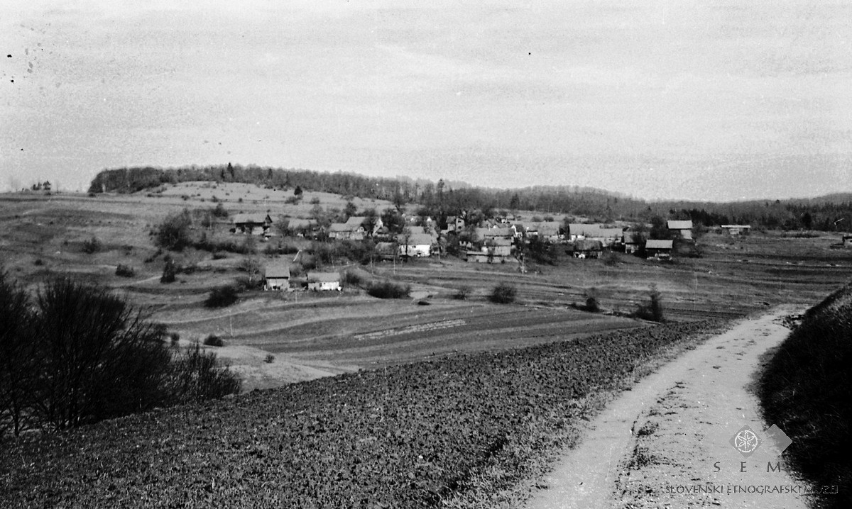 Rožnik, Grosuplje.